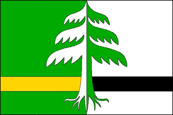 Česky: vlajka obce Radvanice